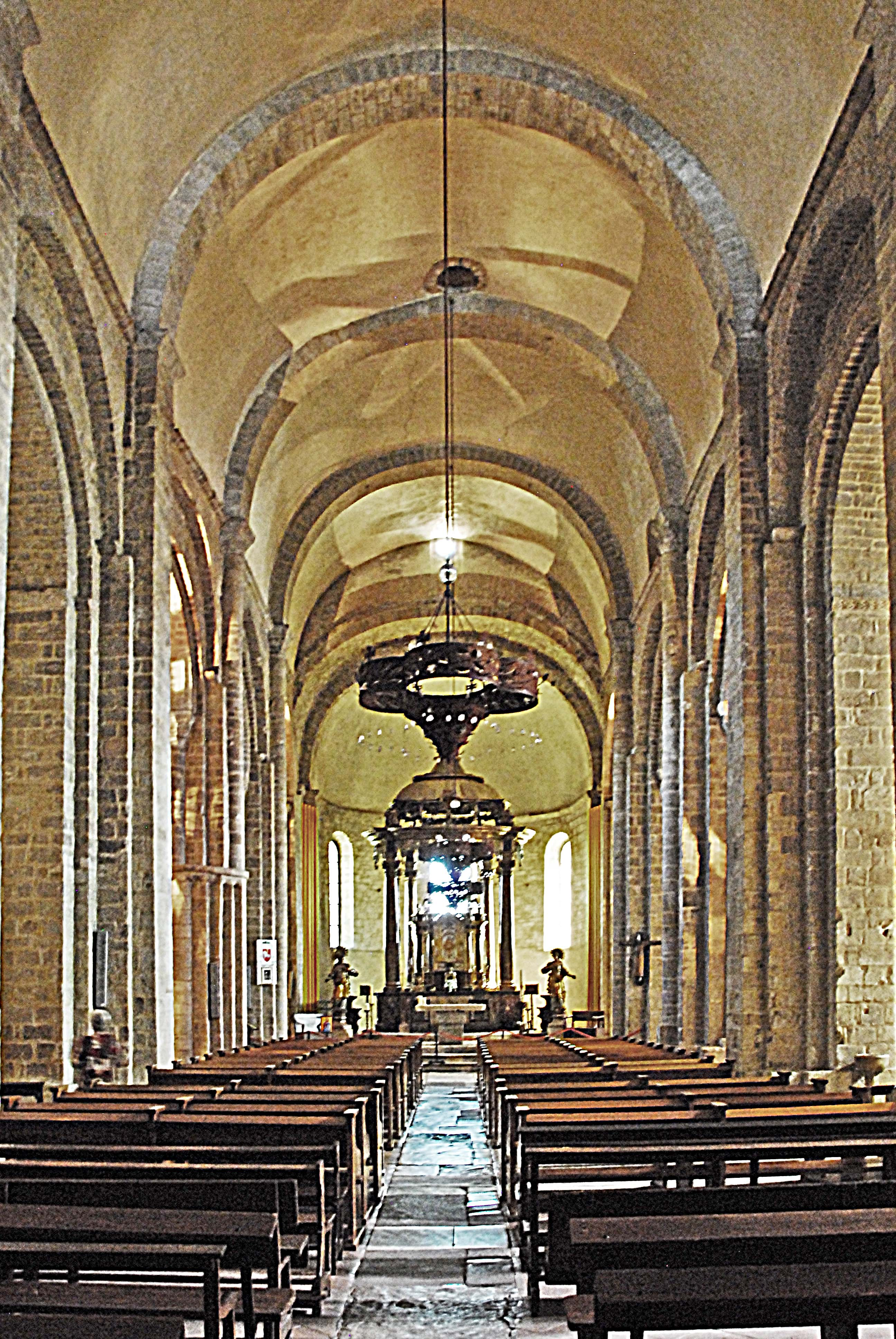 Ste-Eulalie-et-Ste-Julie_d’Elne, Mittelschiff zum Chor